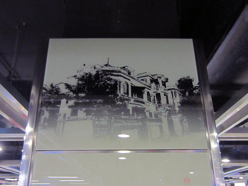 東山口站柱面裝飾